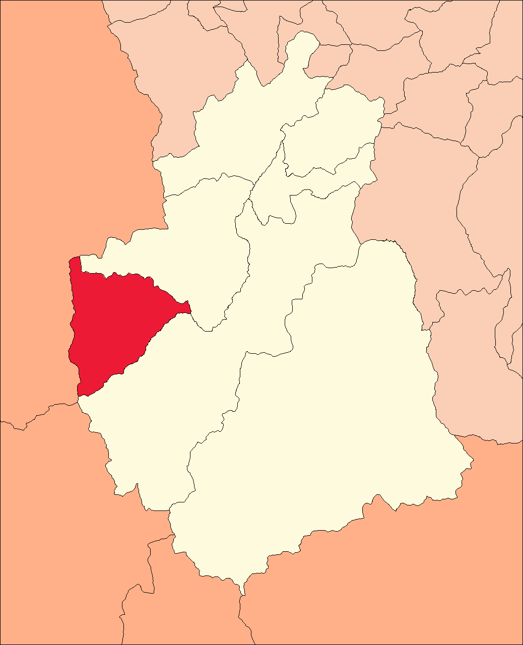 Área del distrito de Queropalca.